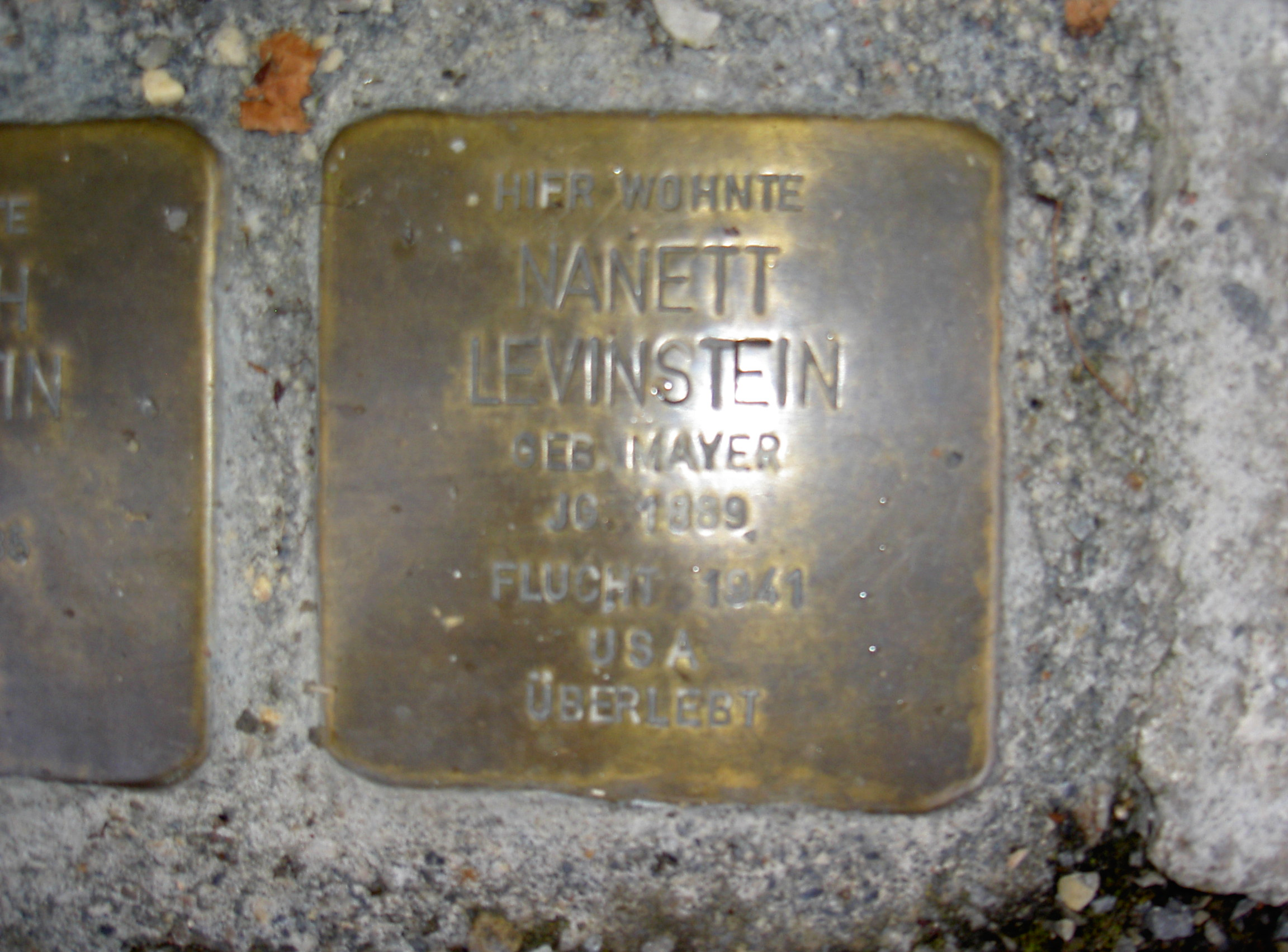 Stolperstein in Themar Levinstein Nanett